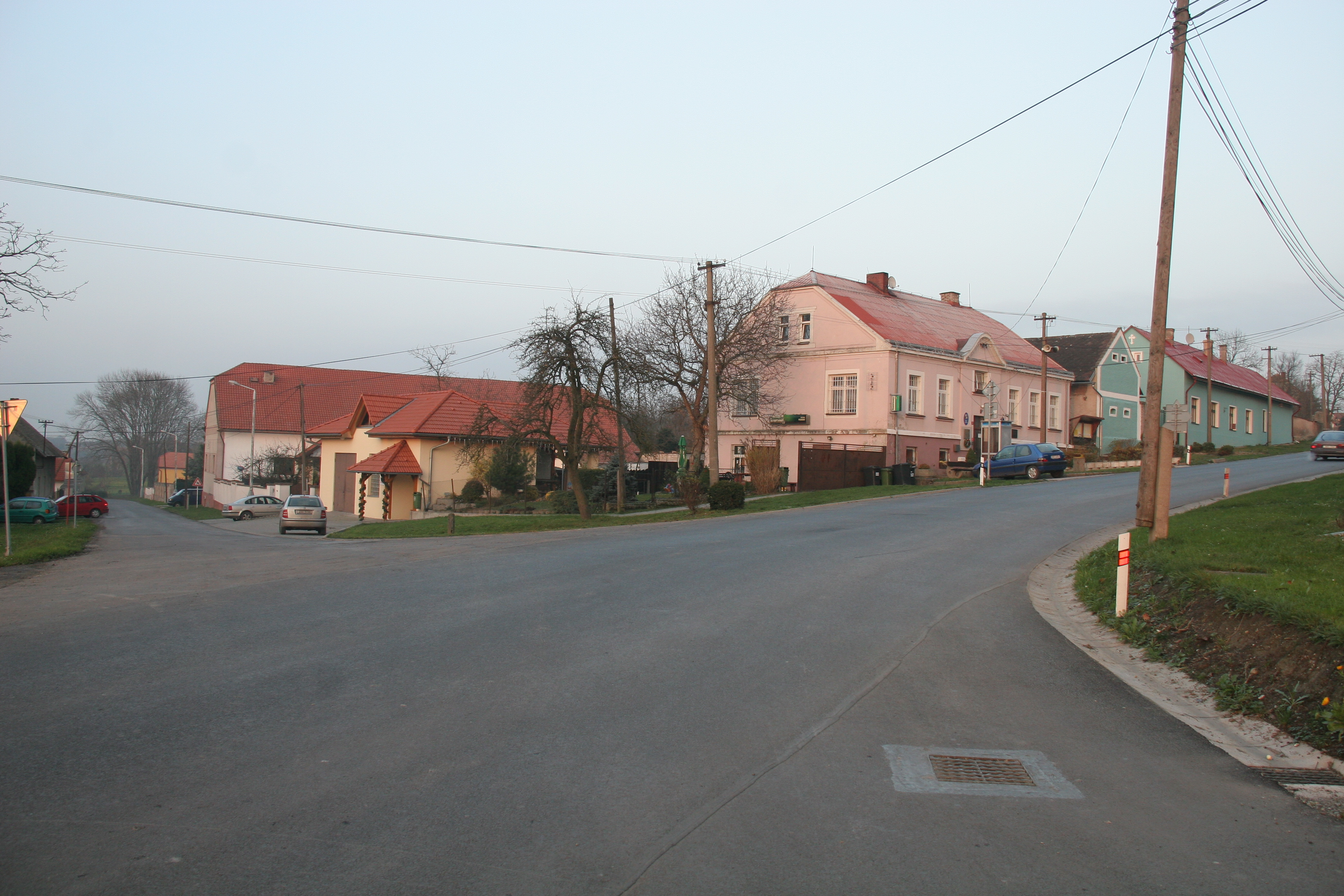 Podmoky křižovatka